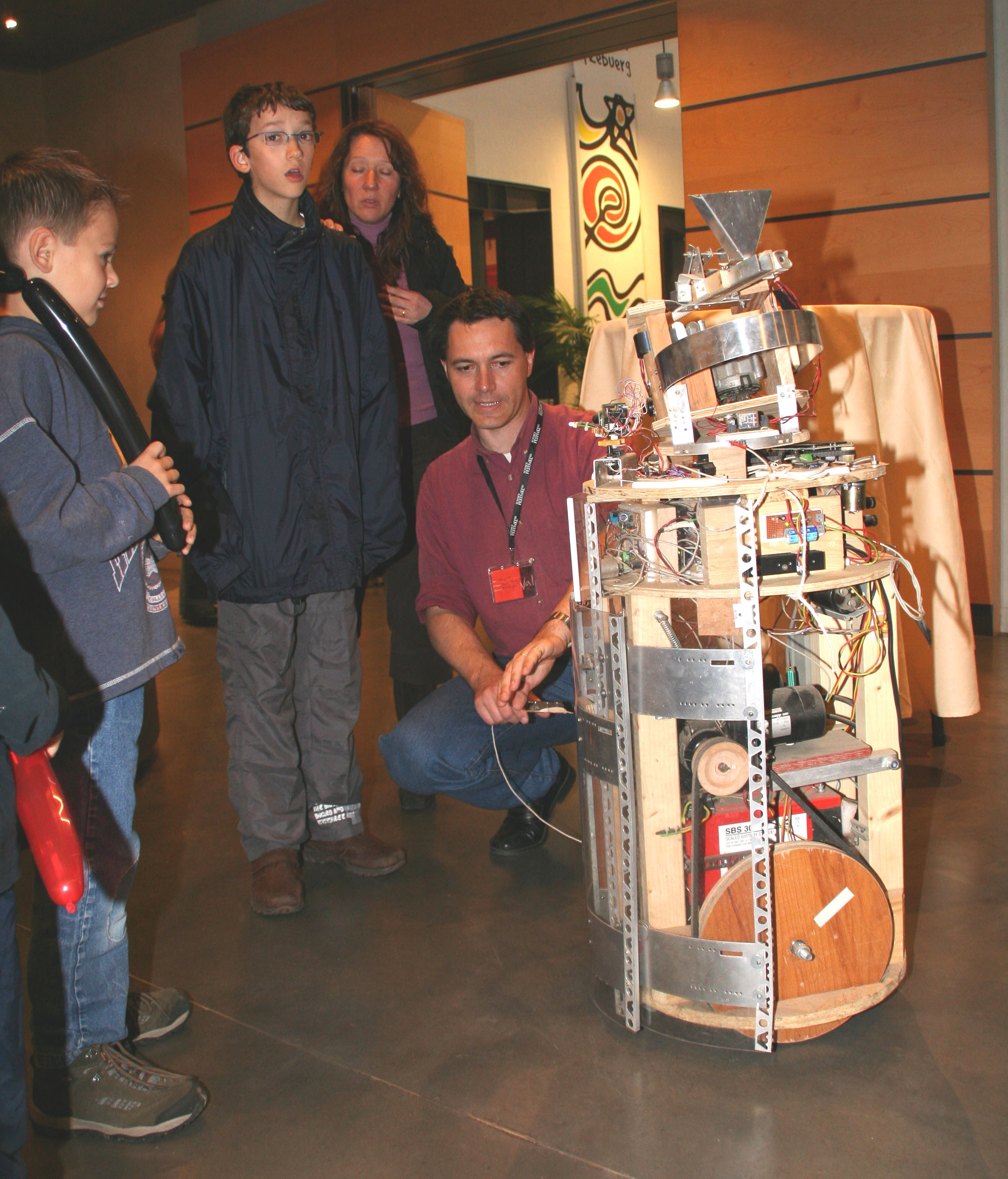 Science Festival 2005.